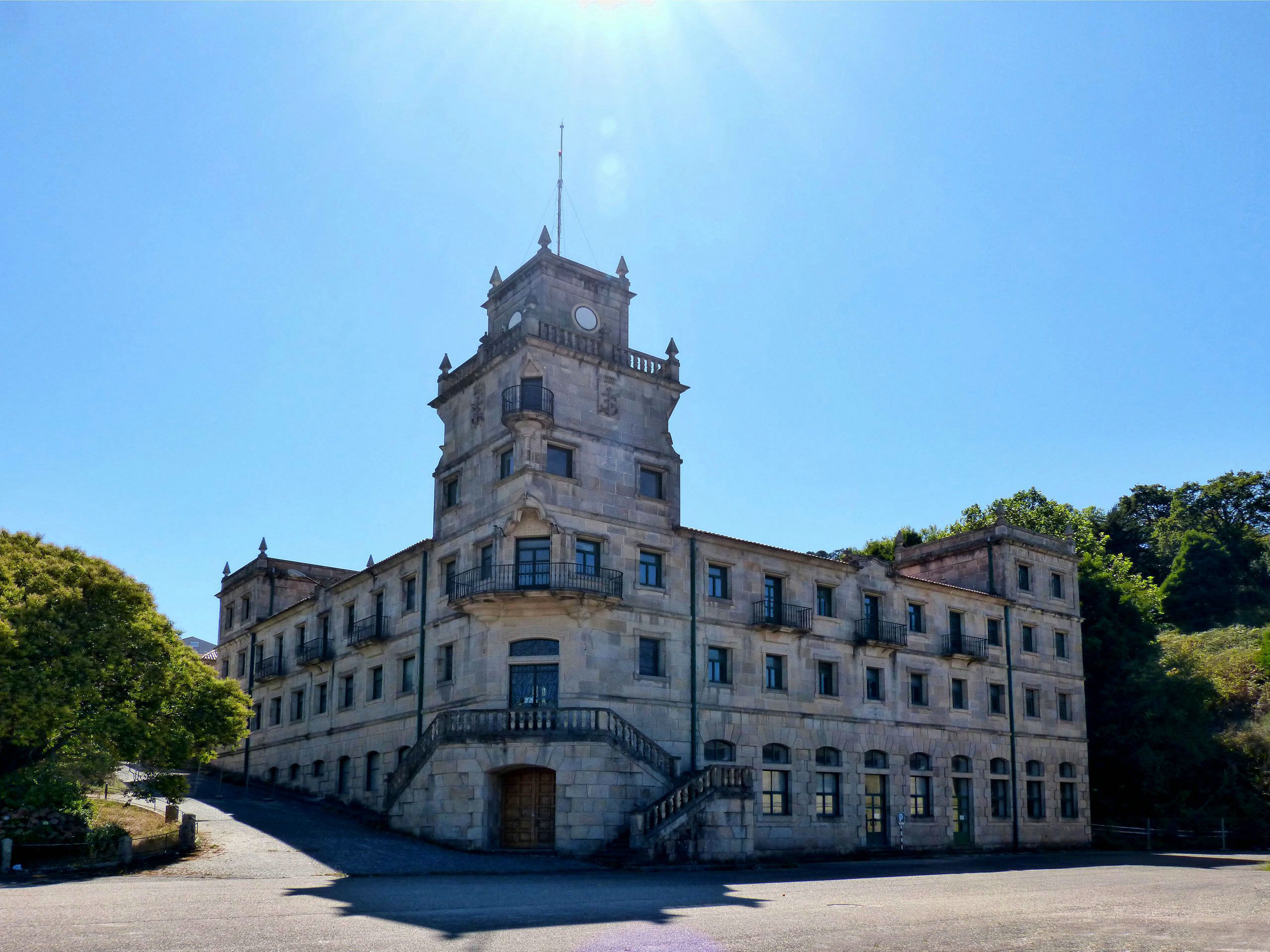 Vigo-La antigua ETEA